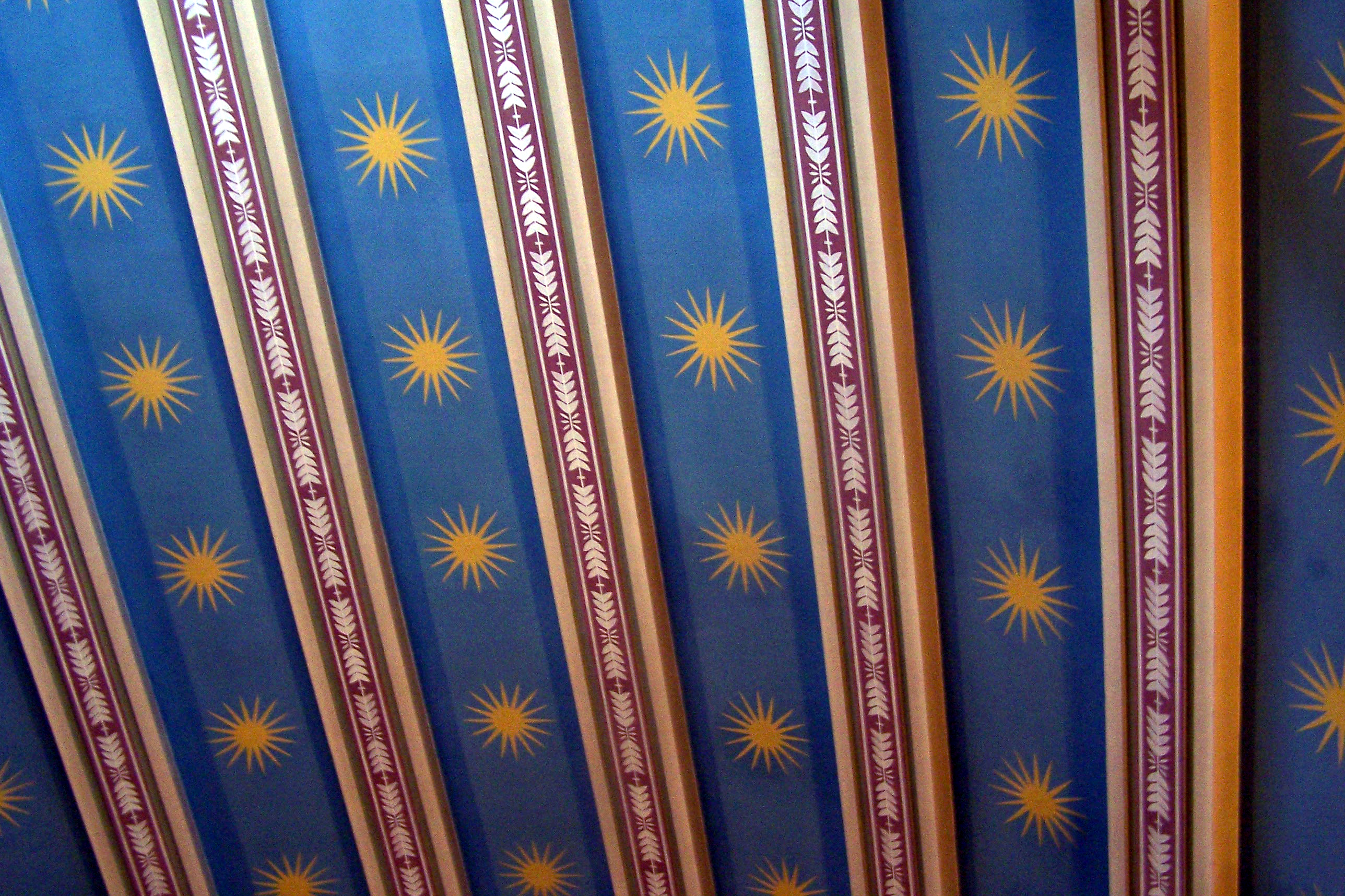 Pardubické krematorium, velká smuteční síň